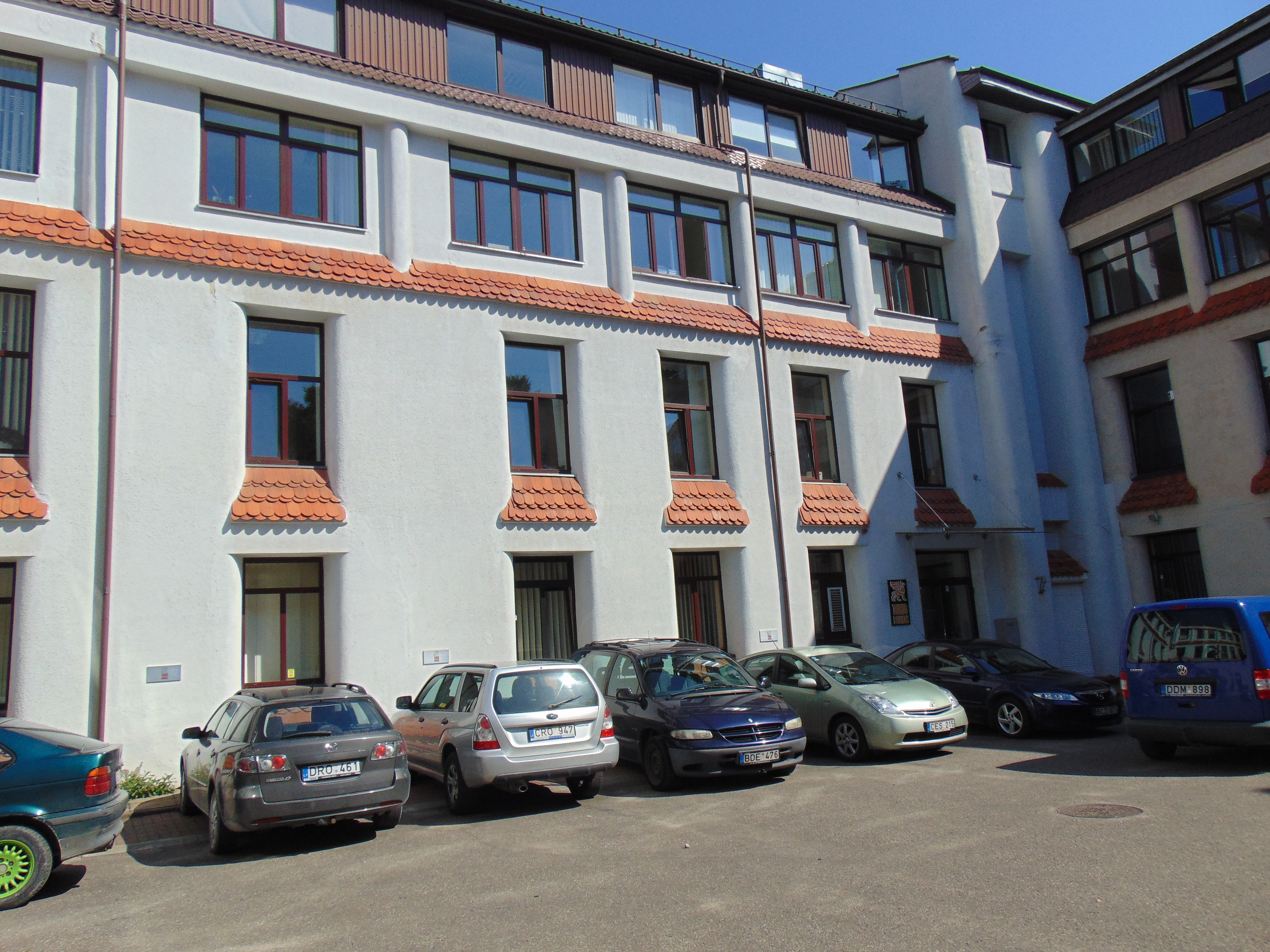 Valdymo koordinavimo centras